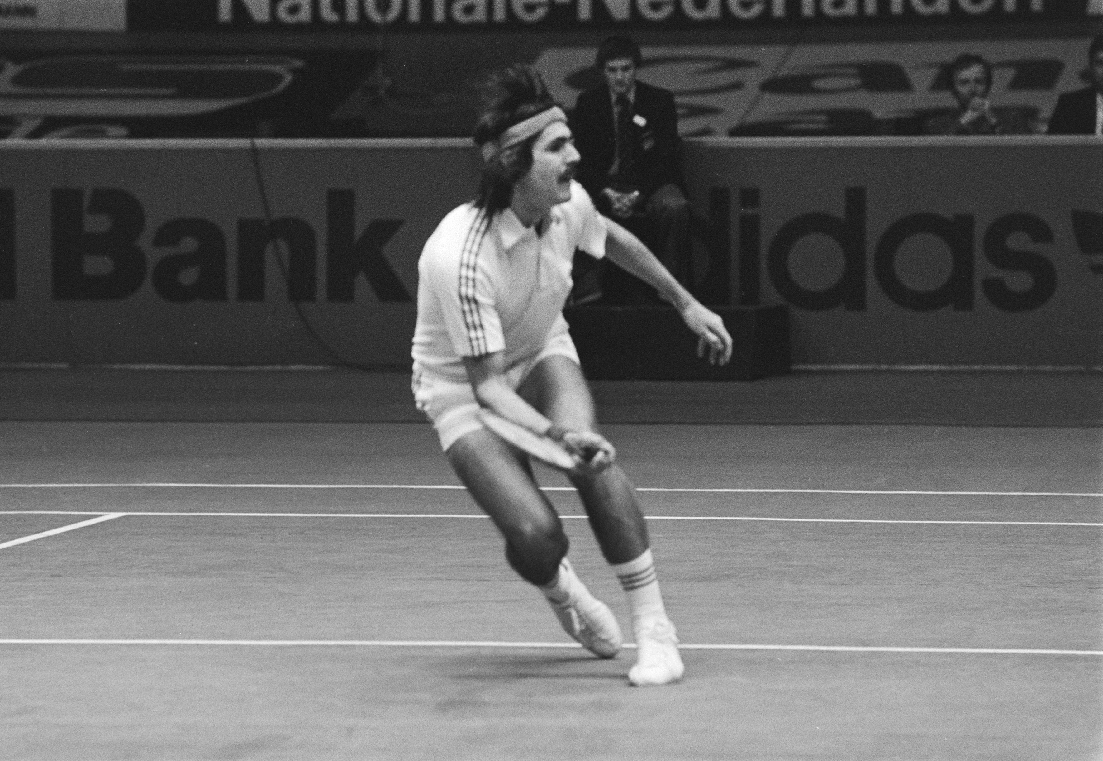 Collectie / Archief : Fotocollectie Anefo Reportage / Serie : [ onbekend ] Beschrijving : ABN-tennistoernooi in Ahoy te Rotterdam, Ramirez in aktie Datum : 17 maart 1981 Locatie : Rotterdam, Zuid-Holland Trefwoorden : TENNIS Persoonsnaam : Ramirez Instellingsnaam : Ahoy Fotograaf : Croes, Rob C. / Anefo Auteursrechthebbende : Nationaal Archief Materiaalsoort : Negatief (zwart/wit) Nummer archiefinventaris : bekijk toegang 2.24.01.05 Bestanddeelnummer : 931-3785